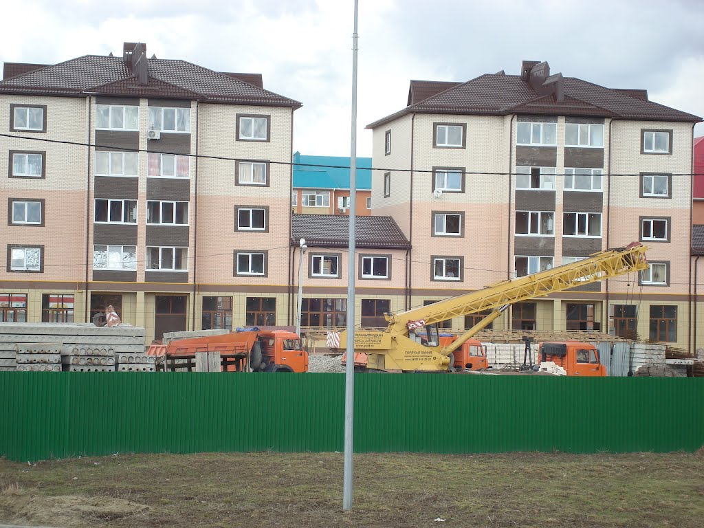 Новостройки, поселок Яблоновский, республика Адыгея